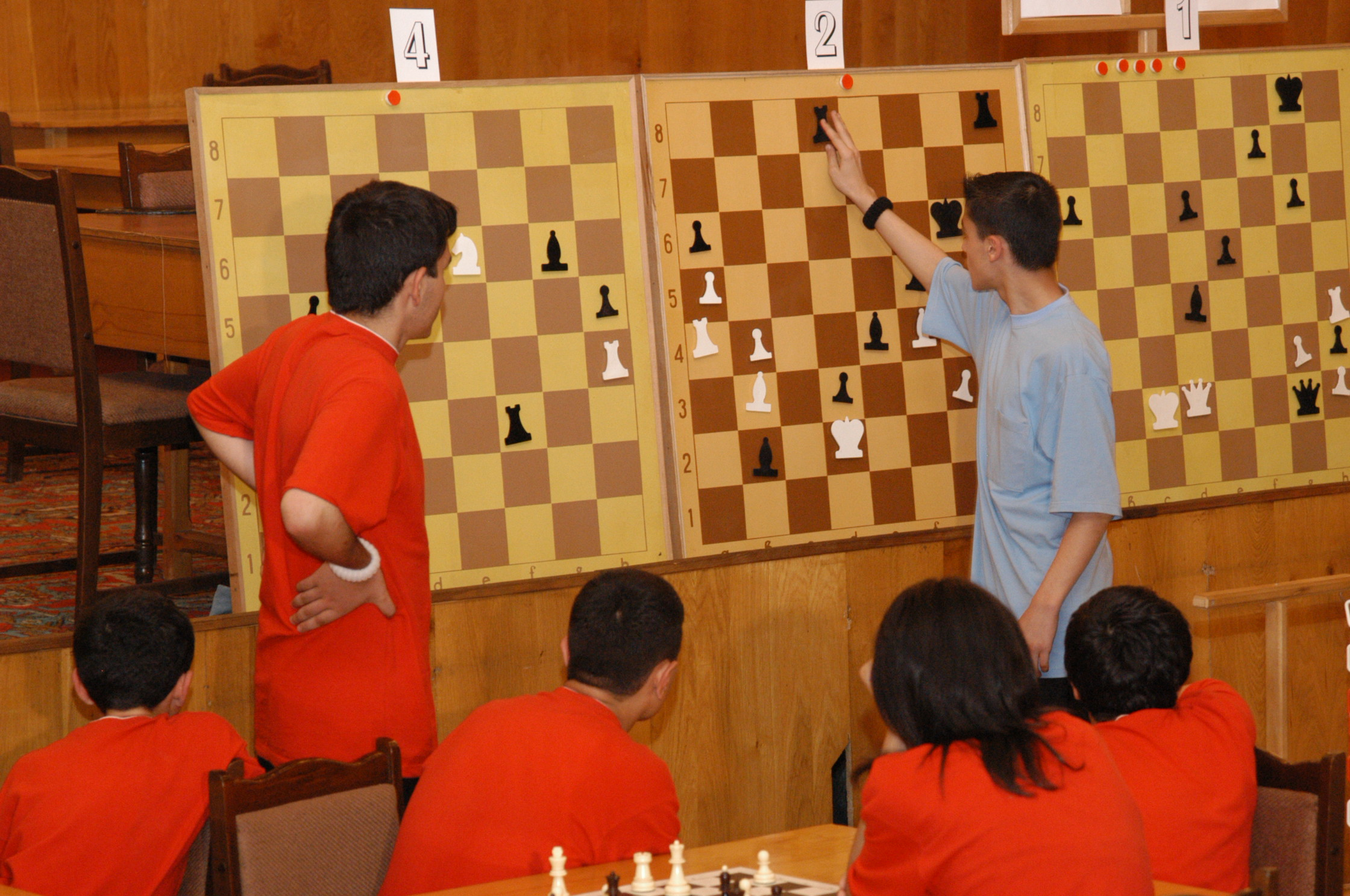 Деловые шахматы - Ветви в деловых шахматах